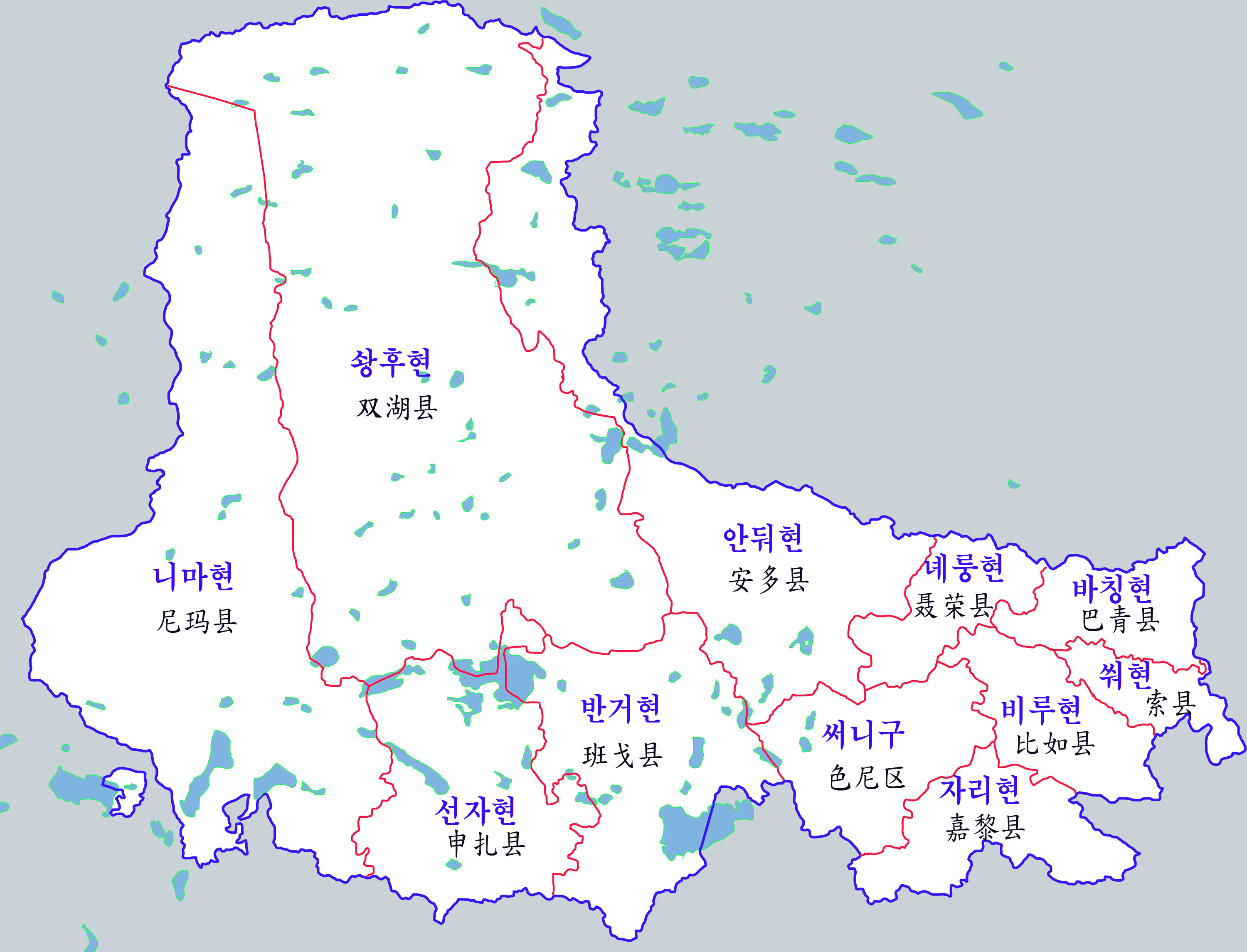 나추행정지도